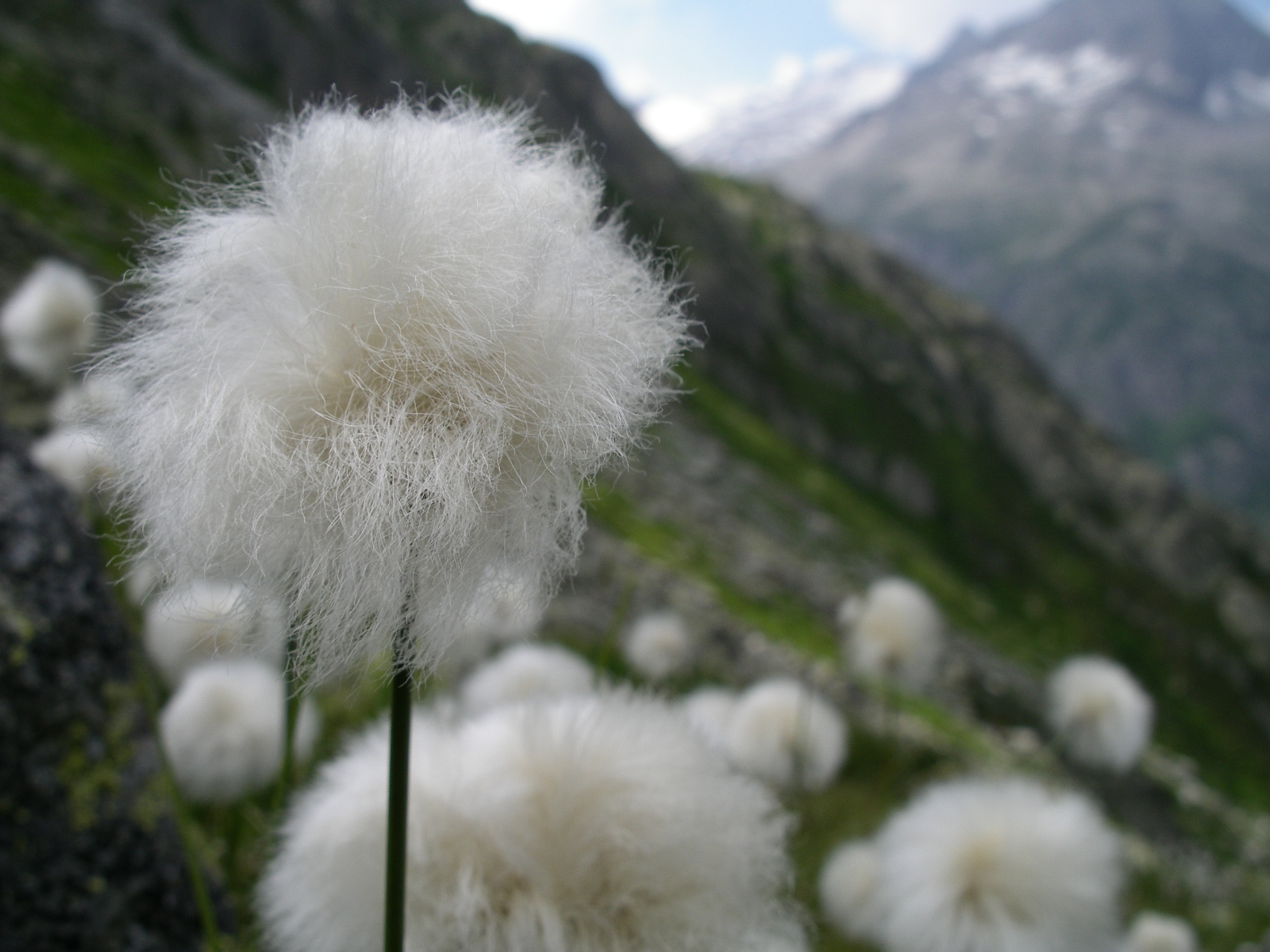 Wollgras (Eriophorum scheuchzeri in der Schweiz)